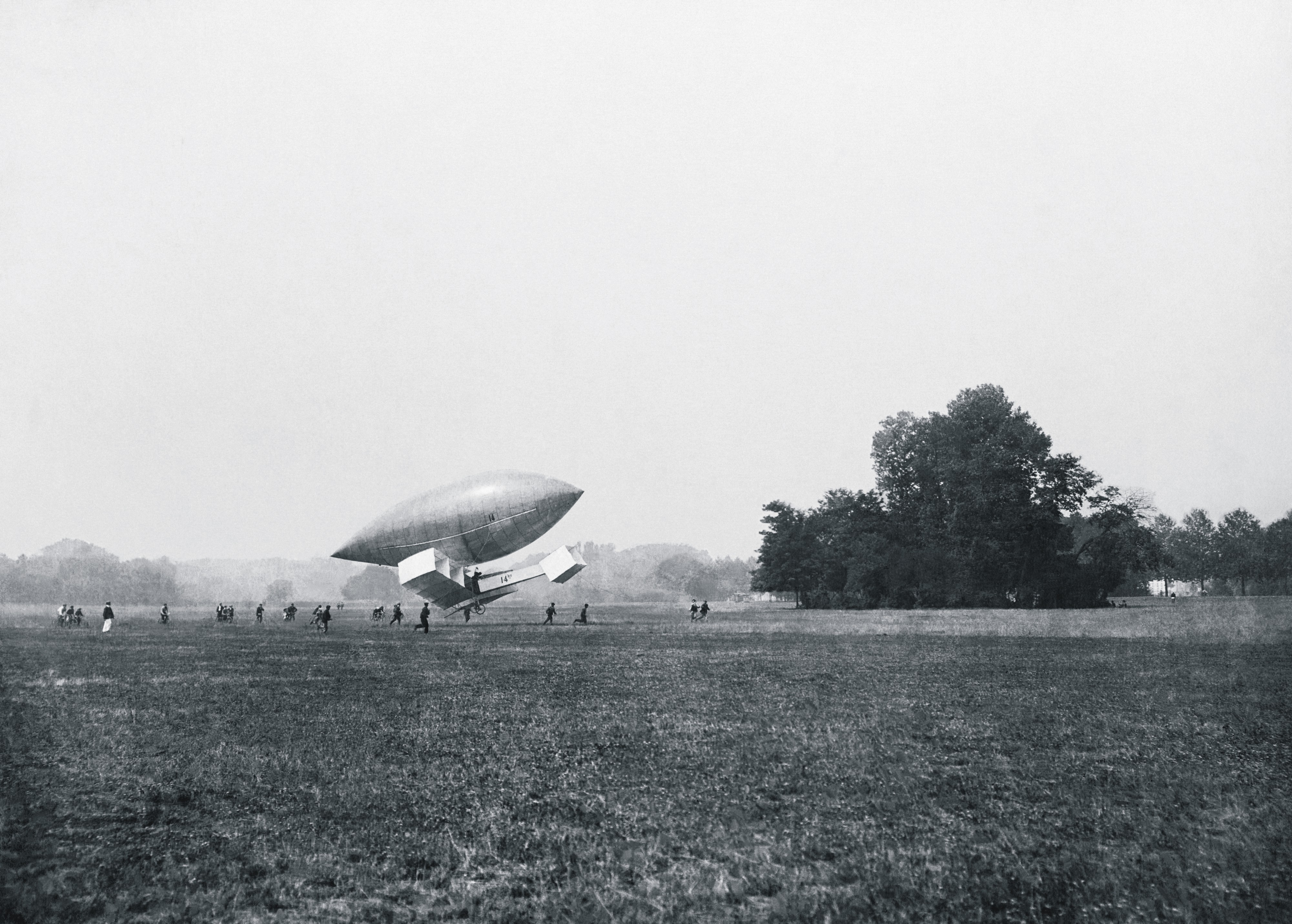 Teste do "14" de Alberto Santos Dumont no campo de Bagatelle (Paris, França) em julho de 1906.